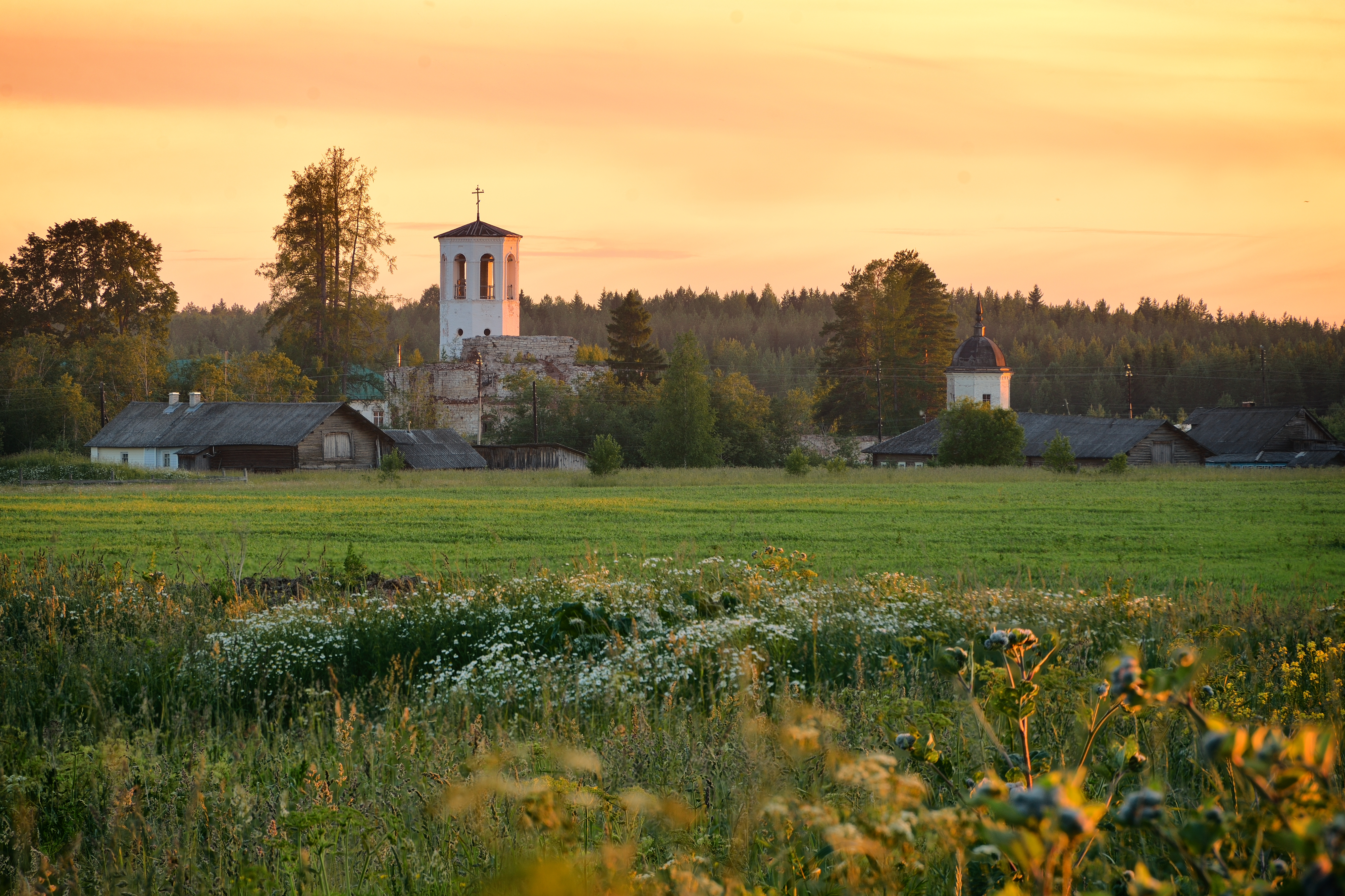 Монастырь Александро-Ошевенский: Ошевенск, Каргопольский район, Архангельская область